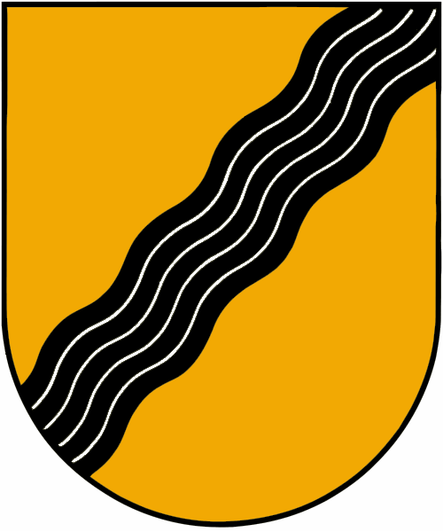 Juodupės herbas